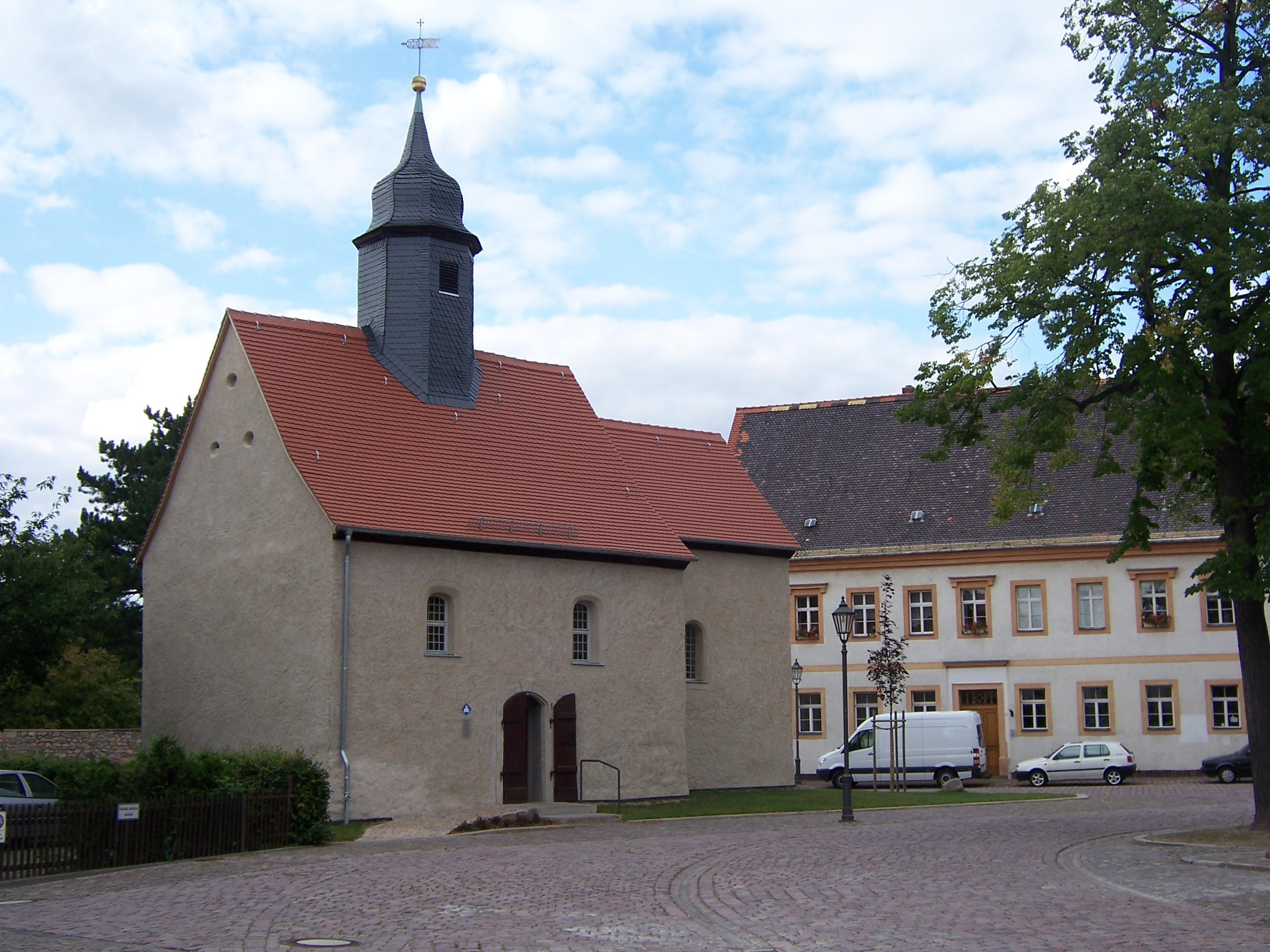 Emmauskirche in Borna, hier am neuen Standort auf dem Martin Luther Platz in Borna